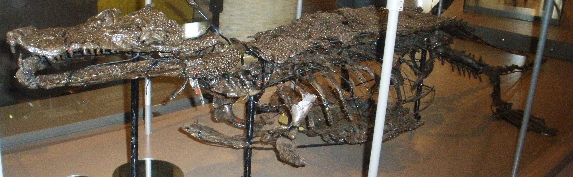 Fossil of Goniopholis IRSNB R47, an extinct crocodile Took the photo at Musee d'Histoire Naturelle, Brussels